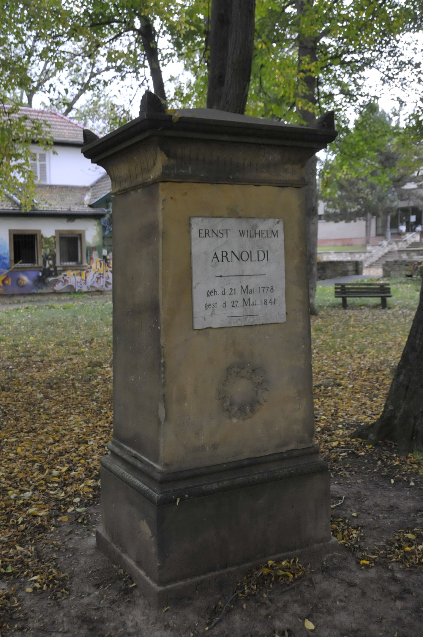 Grabstein von Arnoldi auf dem ehem. Friedhof II in Gotha